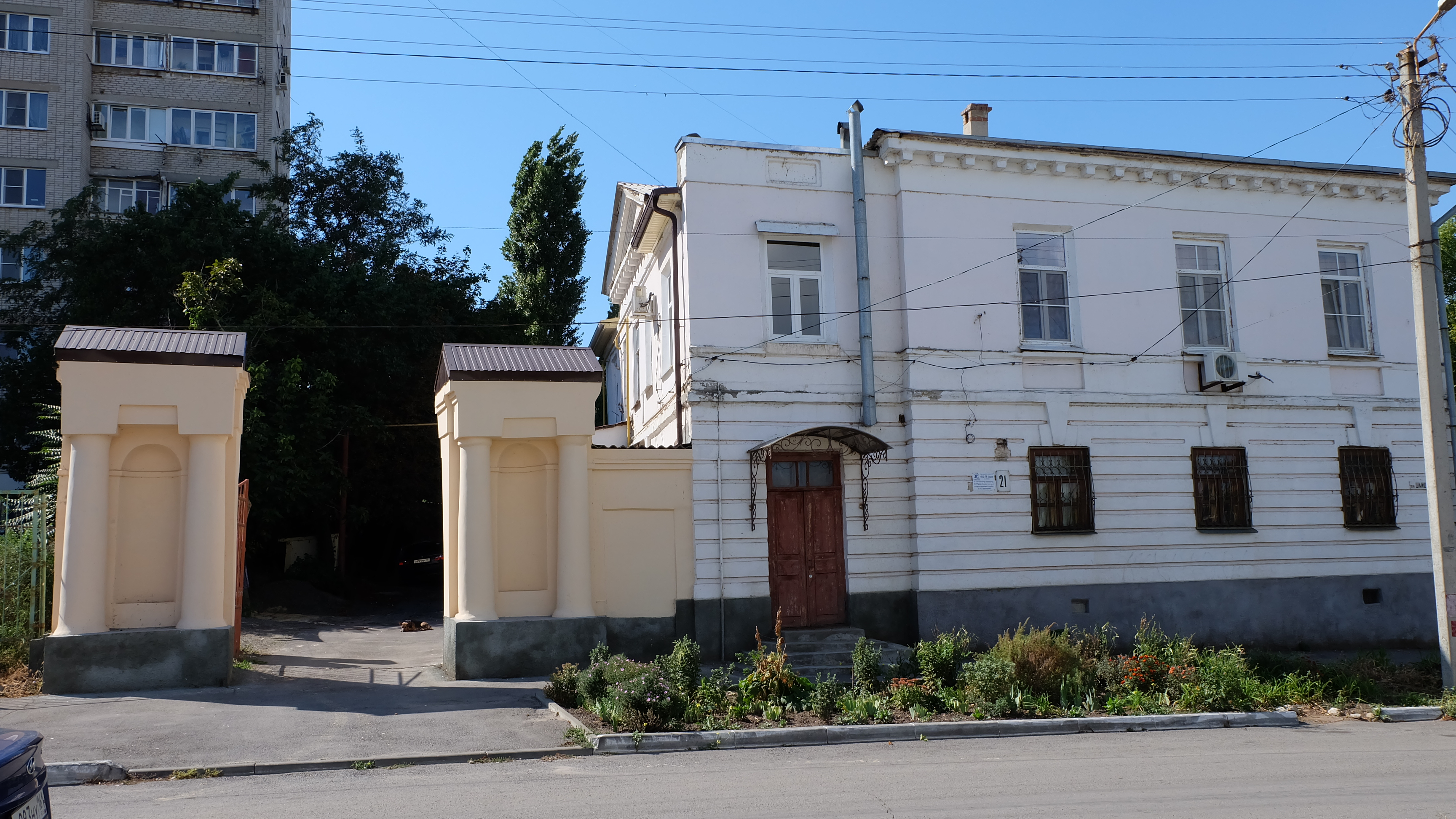 Жилой дом: улица Шмидта, 21, Таганрог, Ростовская область